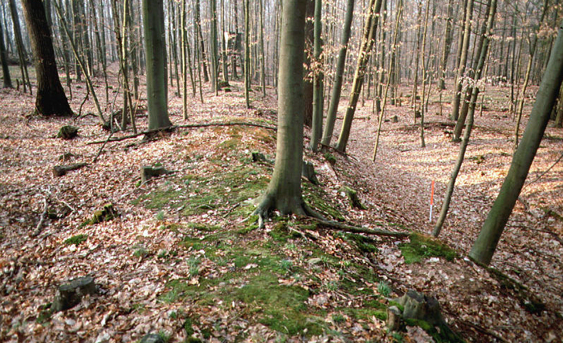 Wall und Graben der Westflanke des Lagers I., Römerlager Hedemünden